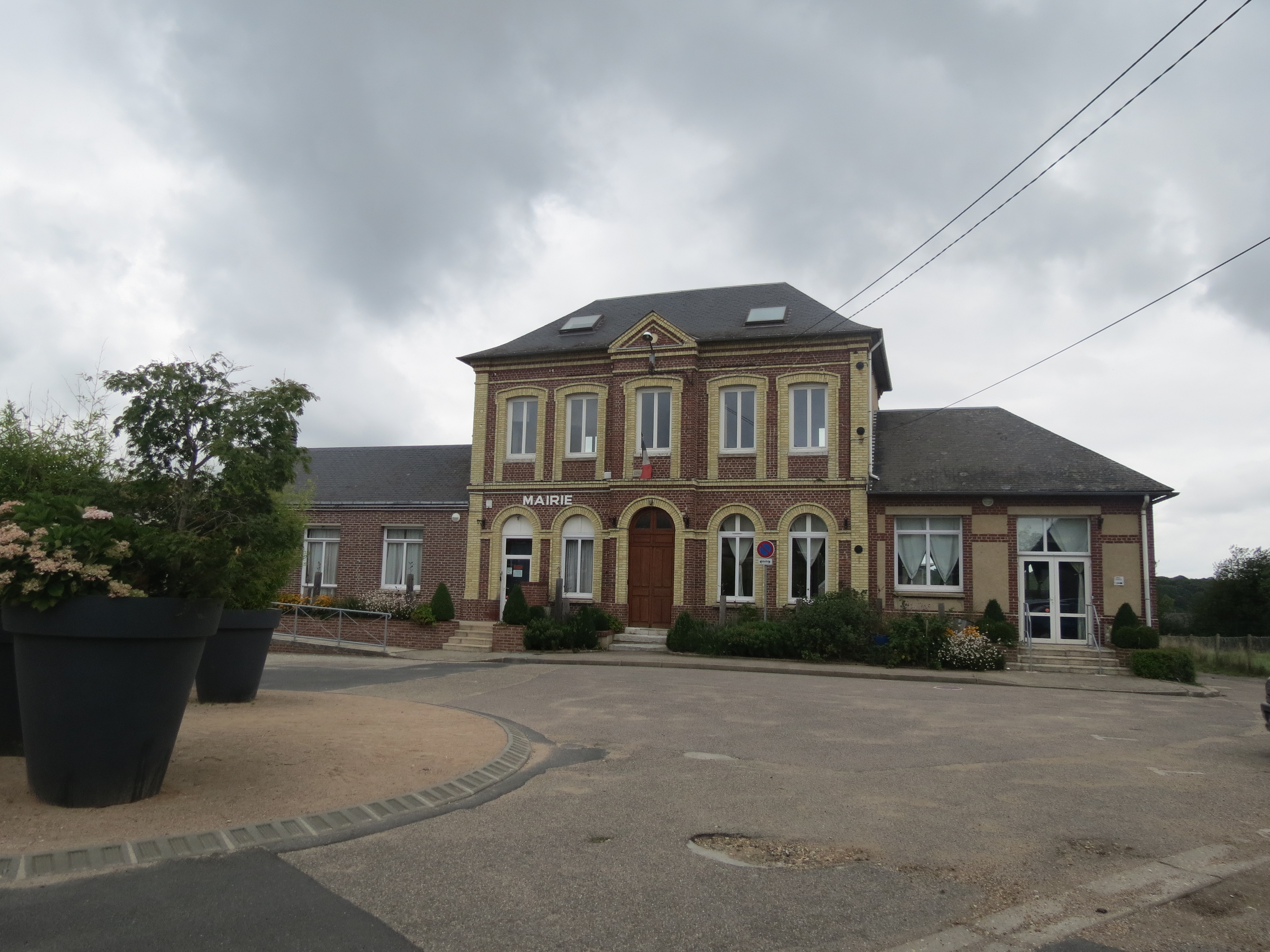 Mairie de Montmain.